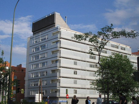 Building in San Fermín (Usera), in Madrid